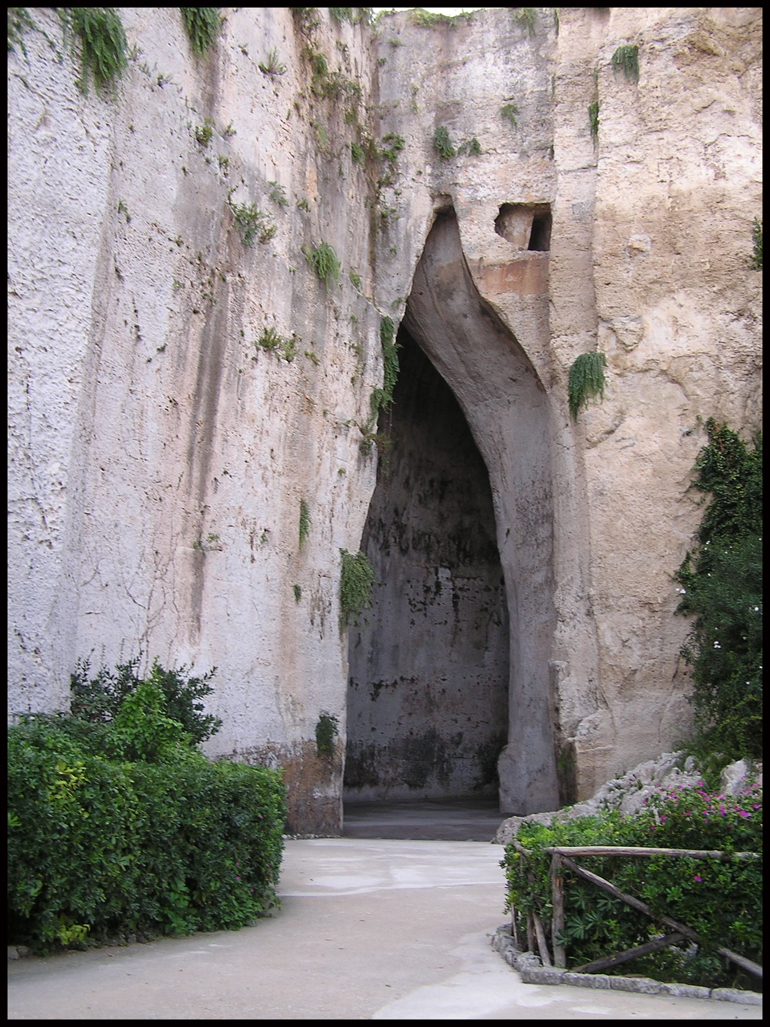 Orecchio di Dionisio in Syracuse